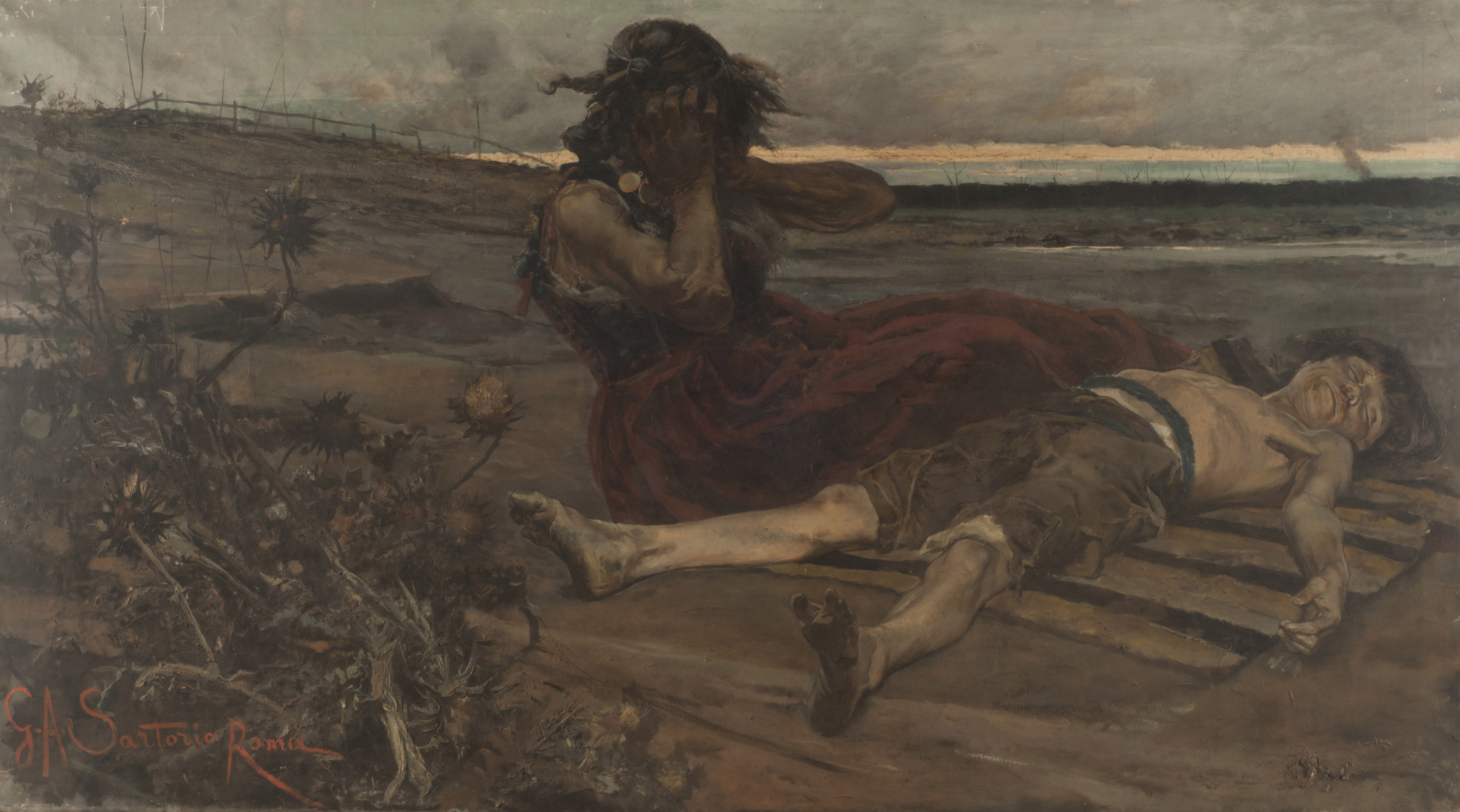 Giulio Aristide Sartorio, Malaria. 1883. 125 x 223 cm, óleo sobre tela. Inv. 5529.